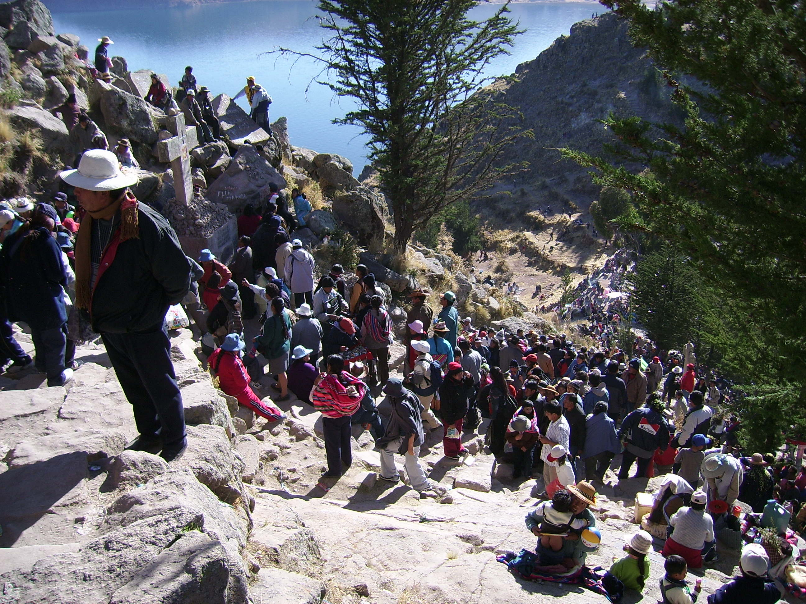 En el pueblo de Copacabana, Bolivia, existe un Virgen que lleva el mismo nombre, a la que los debotos han dedicado una semana de fiesta, dentro de la cual la gente asciende a un morro que domina el paisaje definido por el lago titicaca a 4100 msnm, llevando objetos que simbolizan los objetos que desean se haga realidad con ayuda de la Virgen.